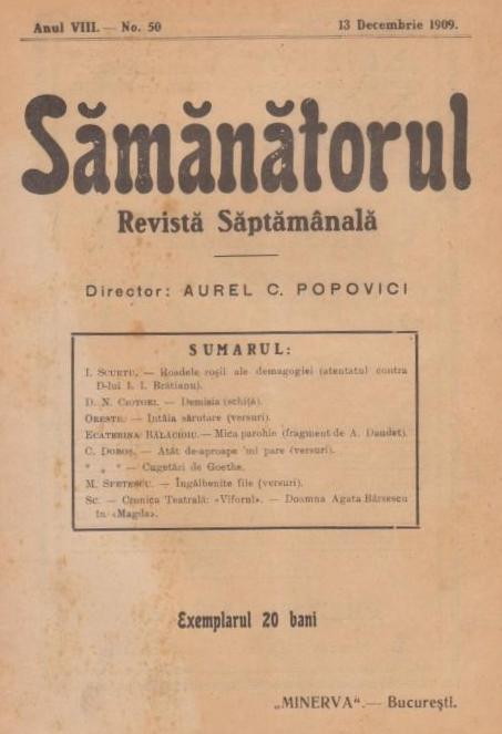 Sămănătorul first page - issue no. 50, dated December 30, 1909